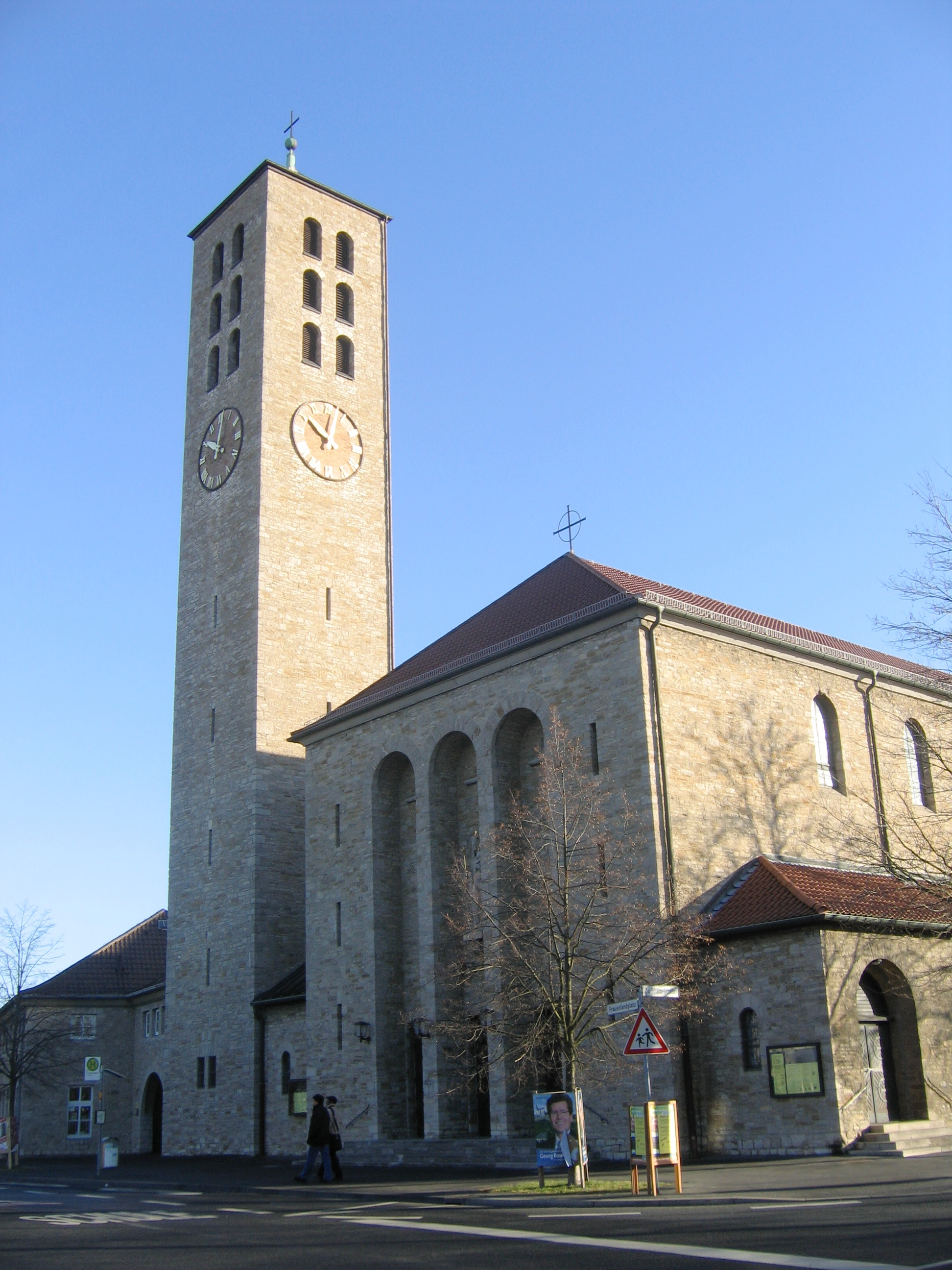 The curch "Unsere Liebe Frau" (ULF) in Würzburg